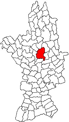 Categorie:Hărţi ale judeţului Olt